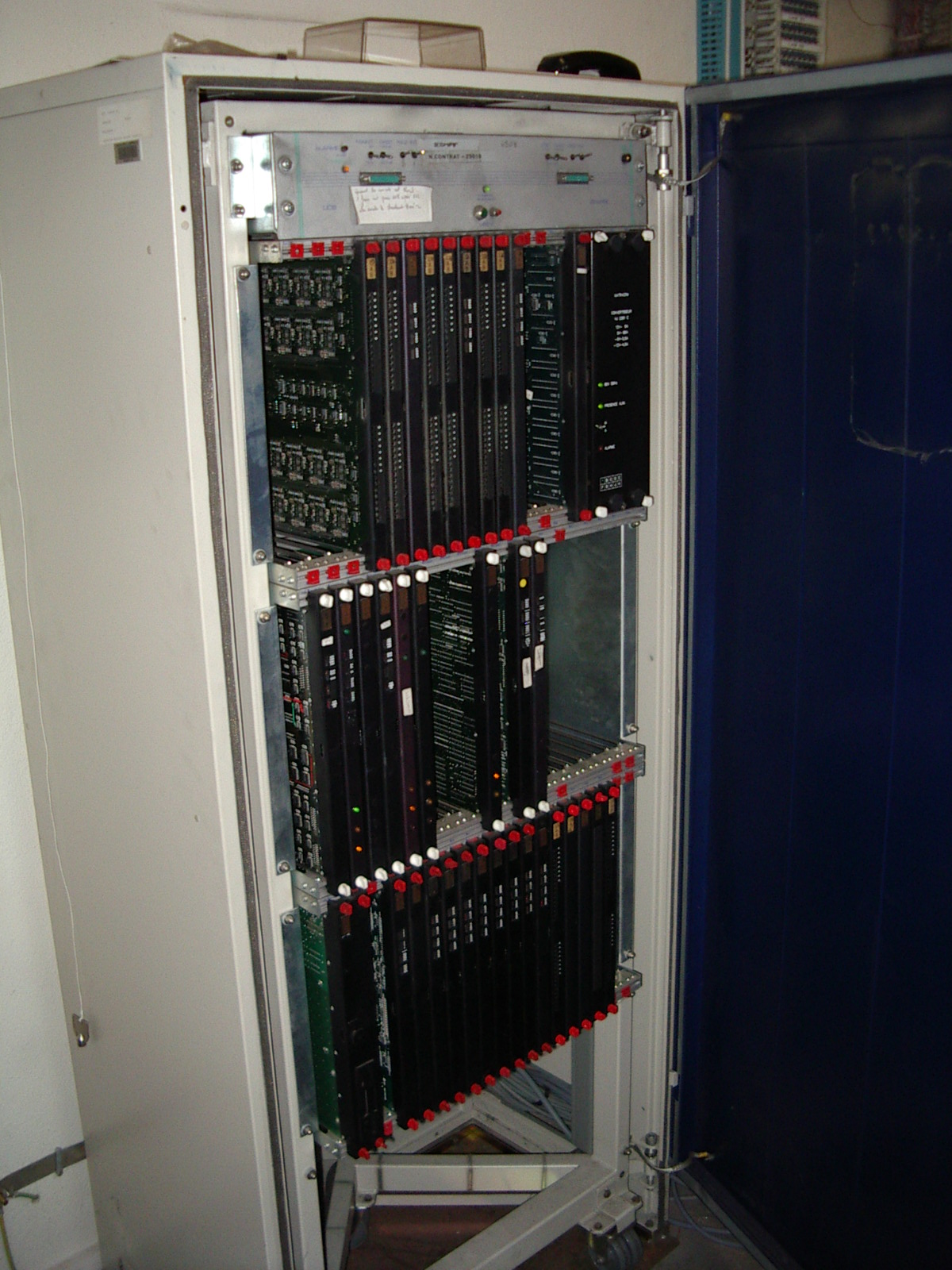 exemple de PABX en fonctionnement, Matra série 6500